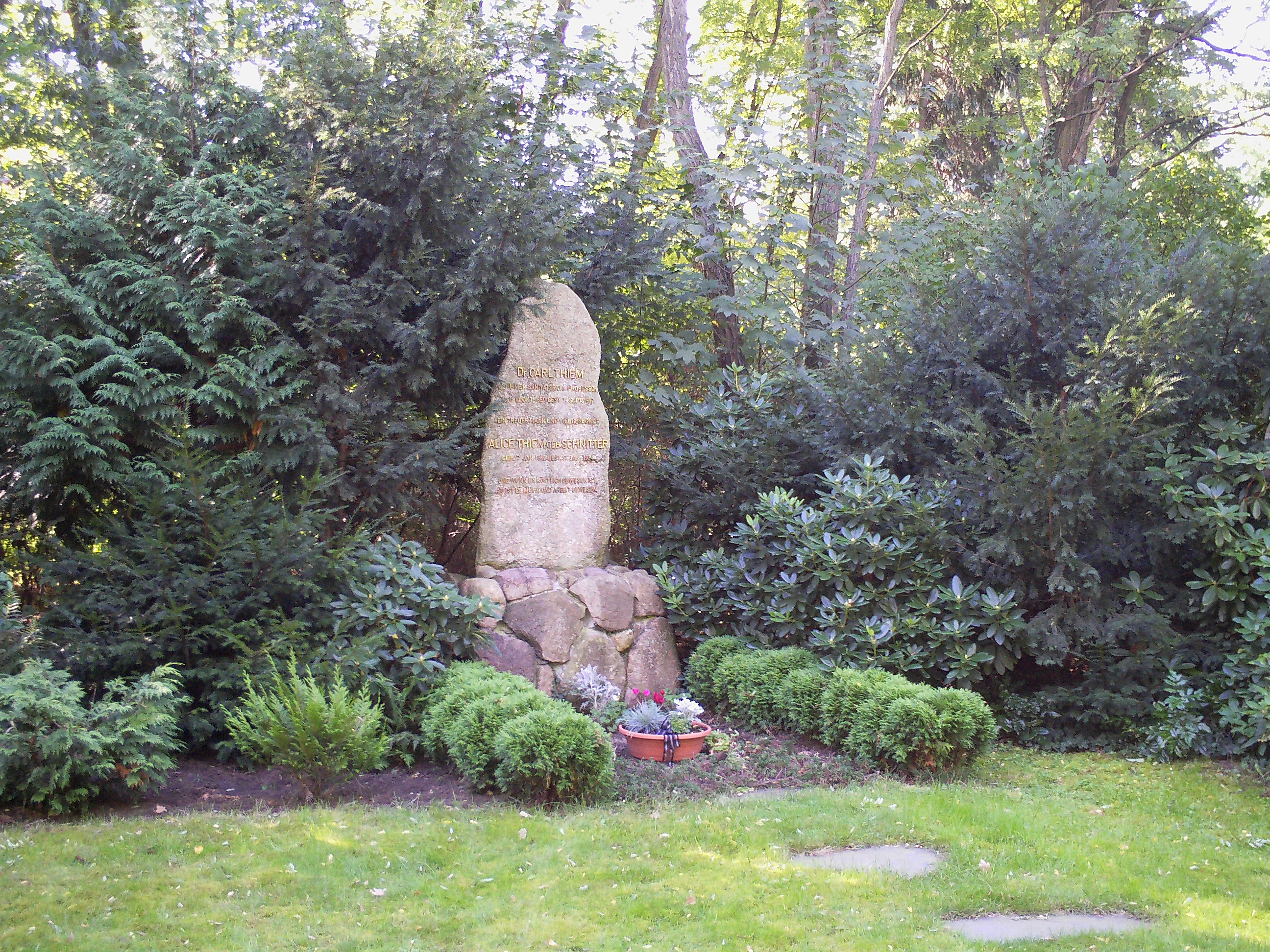 Grabmal Carl Thiem auf dem Südfriedhof